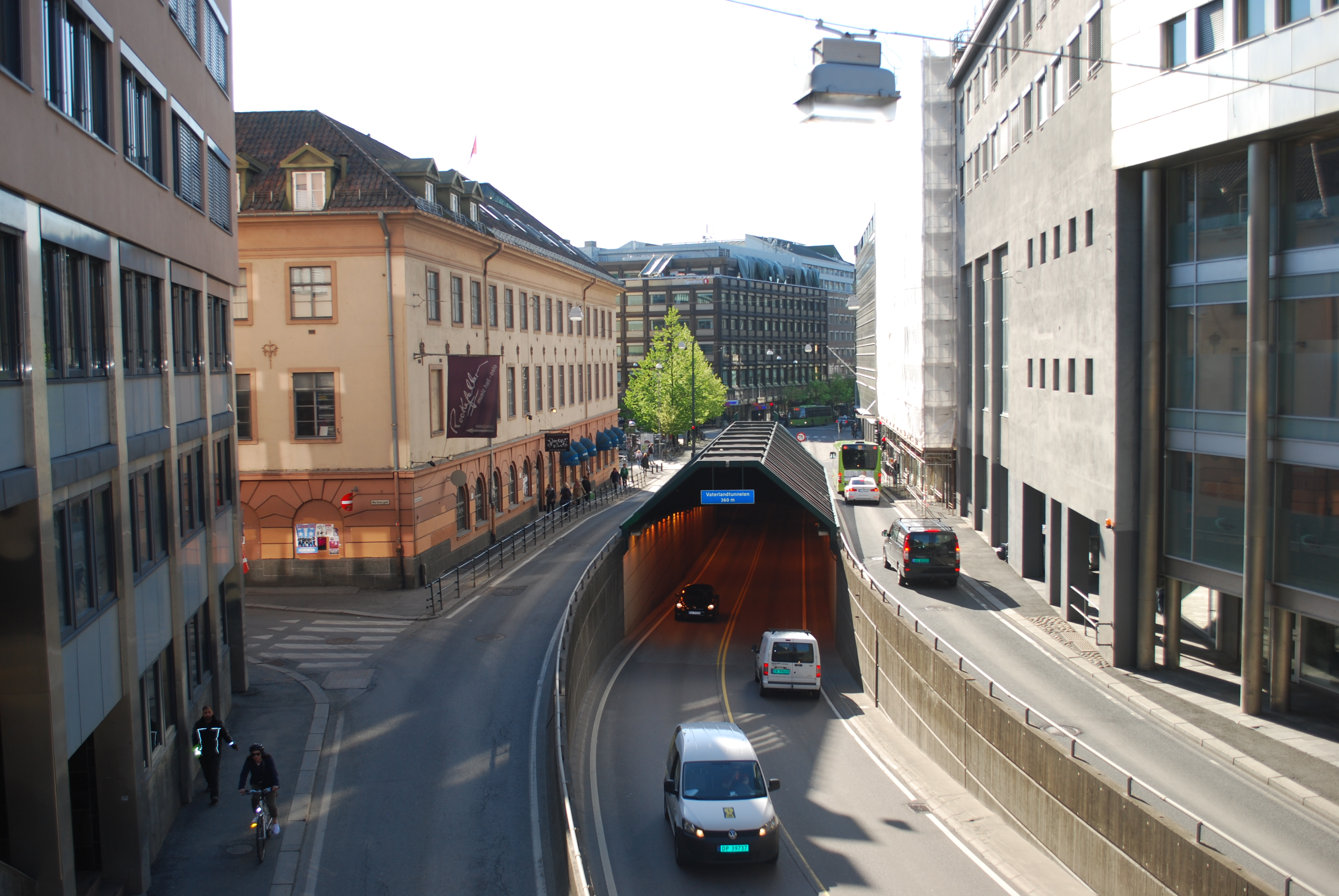 Hammersborggata, med innløpet til Vaterlandstunnelen, Folkets Hus-kvartalet til høyre og Torggata bad (lys bygning) til venstre